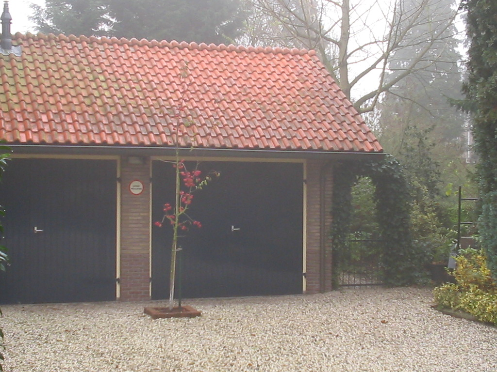 Garage bij een woning in Zeist